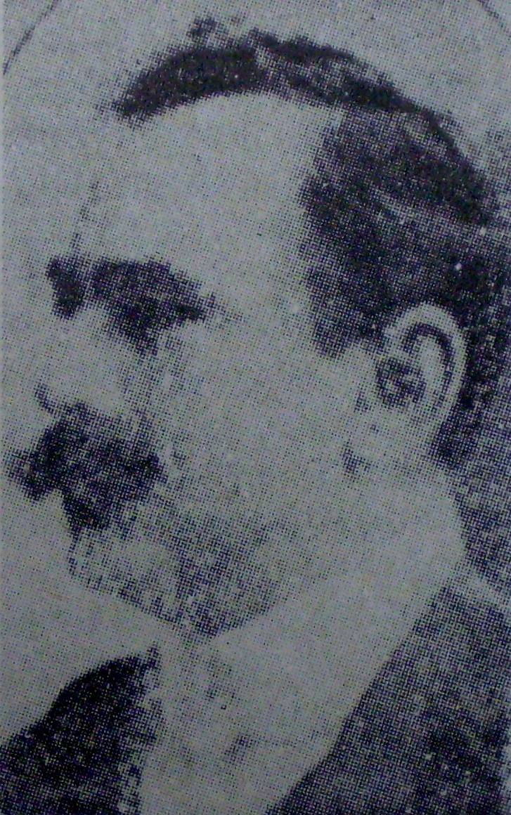 Manuel Gonnet